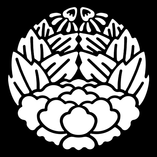 「杏葉牡丹」紋（染抜）。牡丹紋の一種。